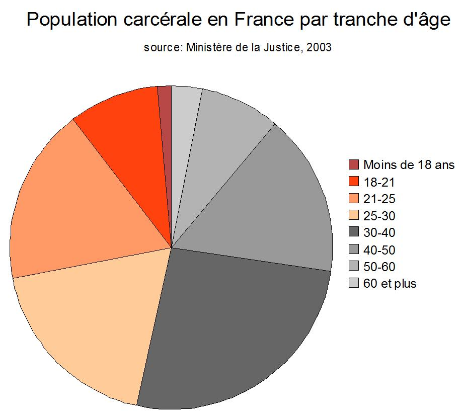 Population_carcérale_par_tranche_d'âge_en_France_-_2003. source : ministère de la justice